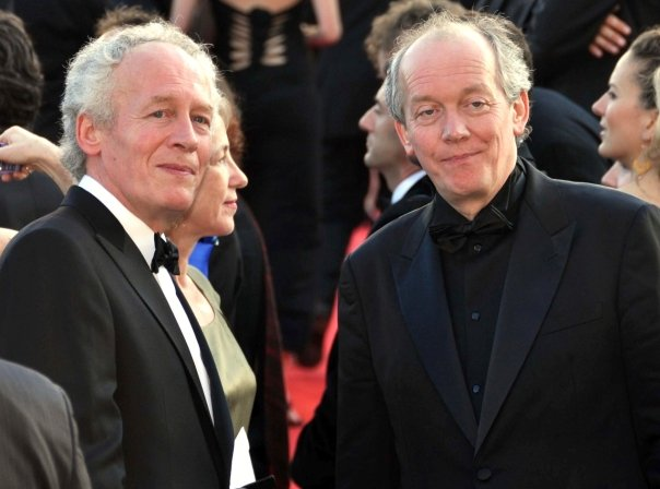 Les Frères Dardenne (Jean-Pierre à gauche, Luc à droite) au festival de Cannes.